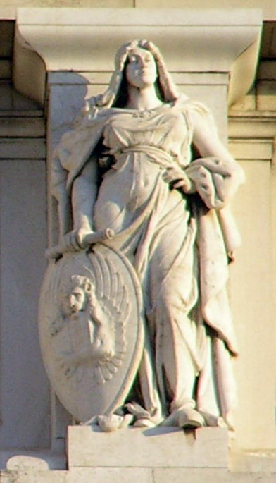 Vittoriano - statue delle regioni - Veneto